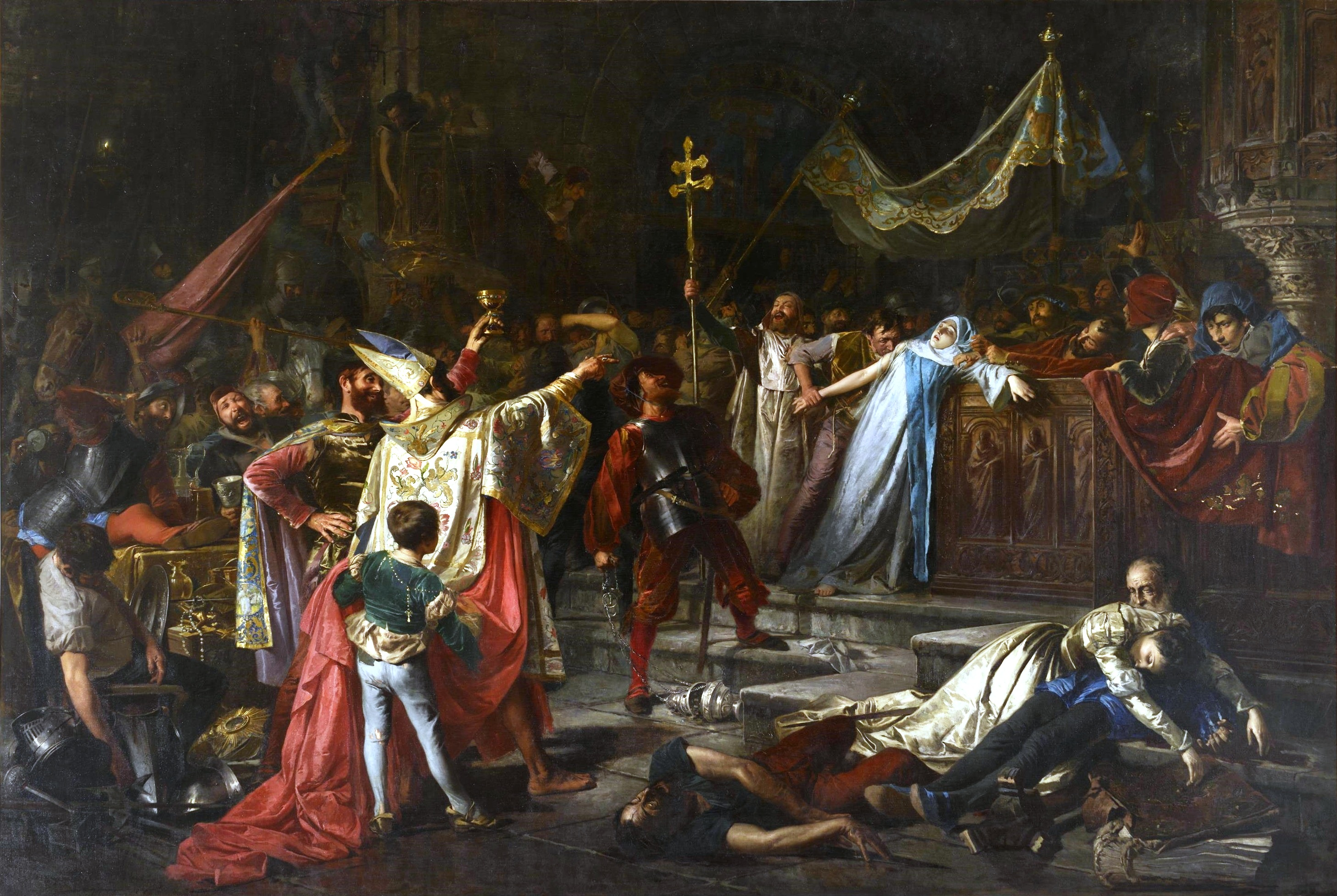 La obra está inspirada en el Saco de Roma, que fue llevado a cabo el 6 de mayo de 1527 por las tropas españolas y alemanas del emperador Carlos I de España, y representa a un grupo de soldados saqueando y profanando el interior de una iglesia romana.